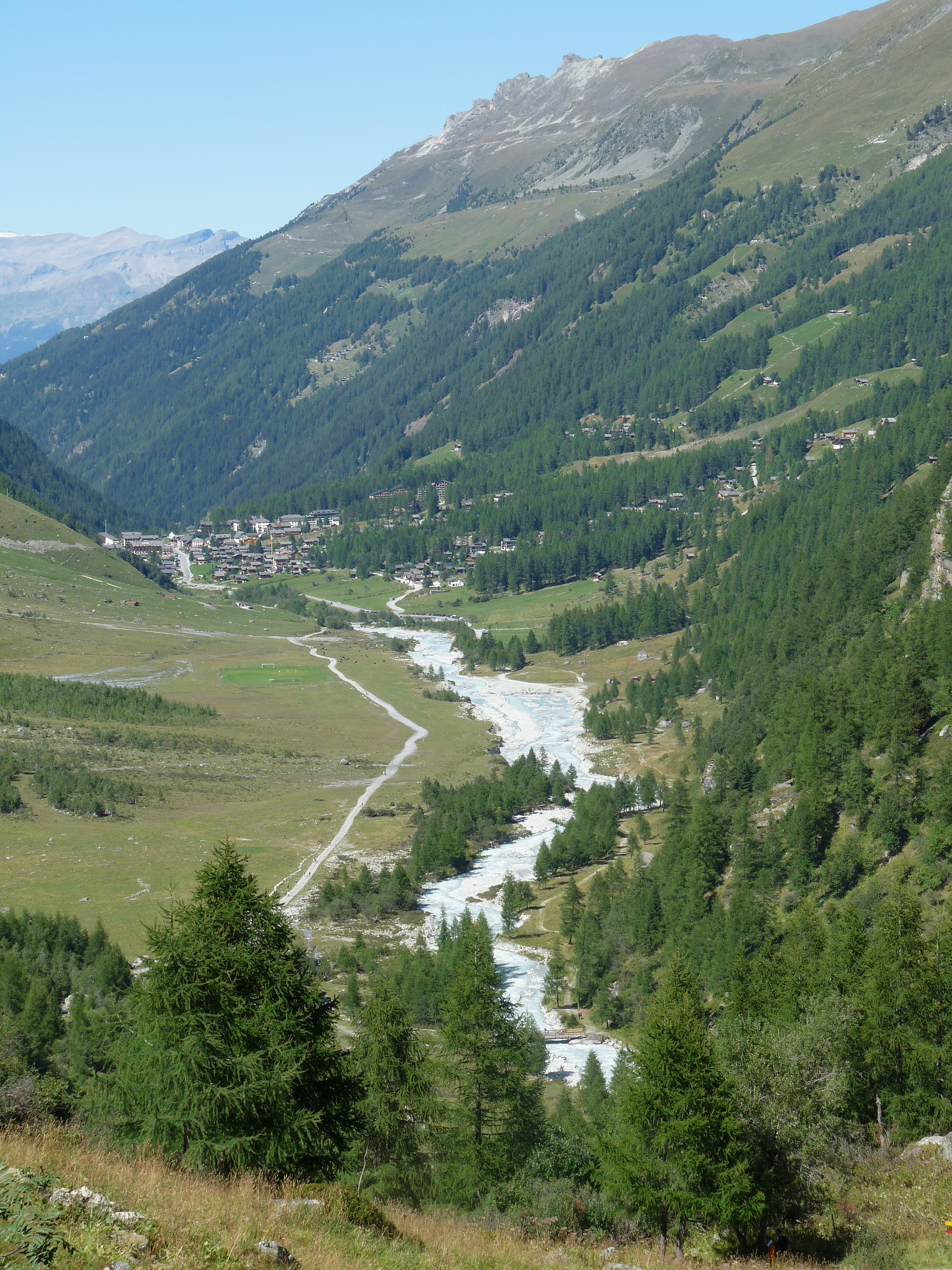 La Navizence à Zinal (Valais, Suisse)